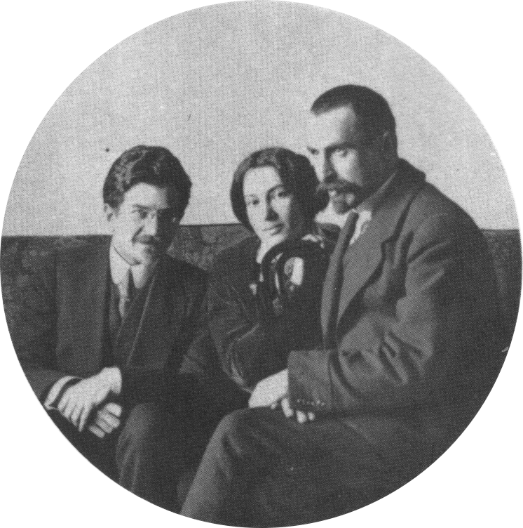 Semyon Lazarevich Vainshtein (1879-1923), Lidia Dan e Irakli Tsereteli en Irkutsk en 1914-1915.